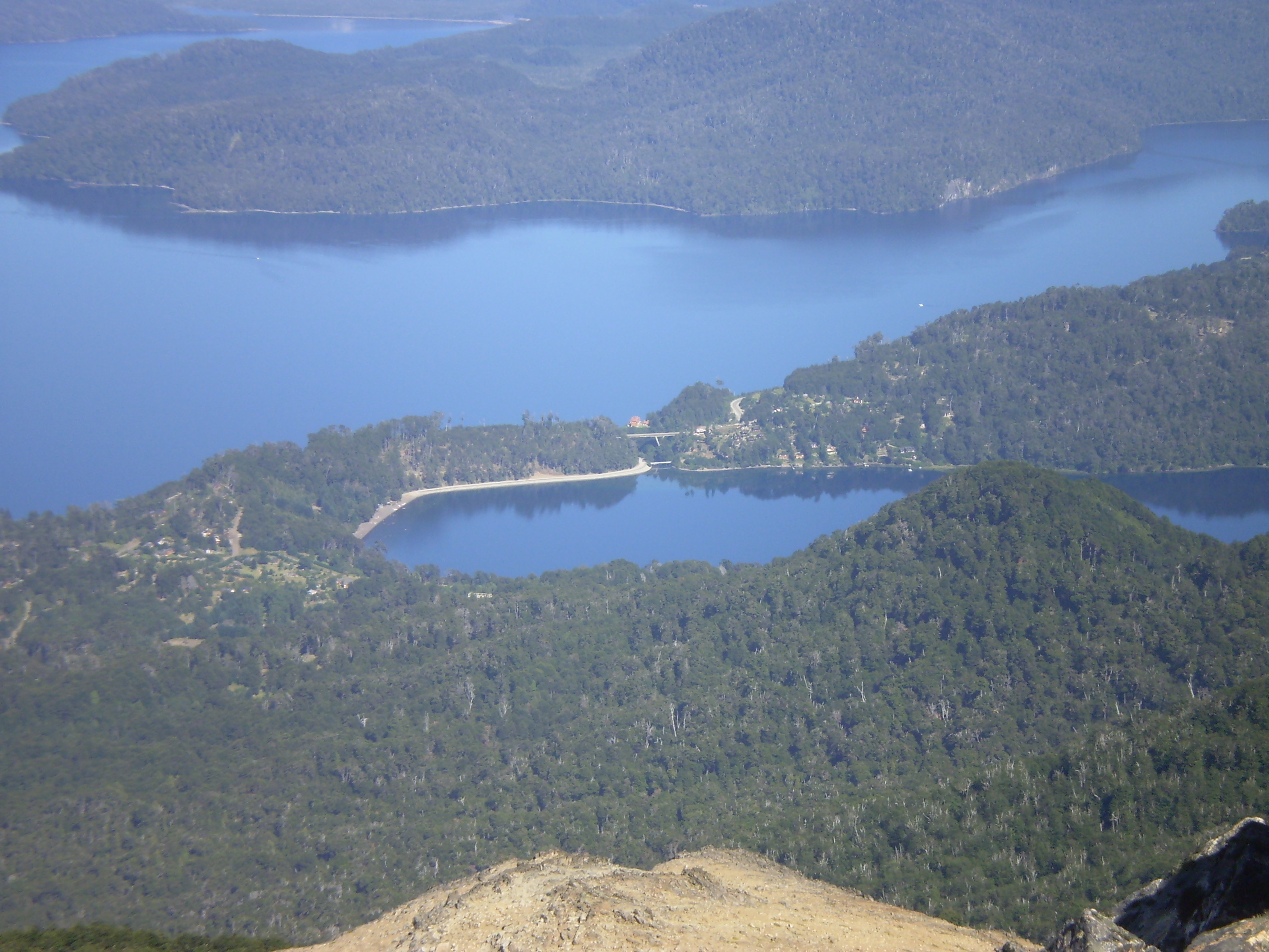 (Lago Correntoso visto desde el cerro Bayo, detrás el lago Nahuel Huapi) Villa La Angostura, Neuquén, Argentina